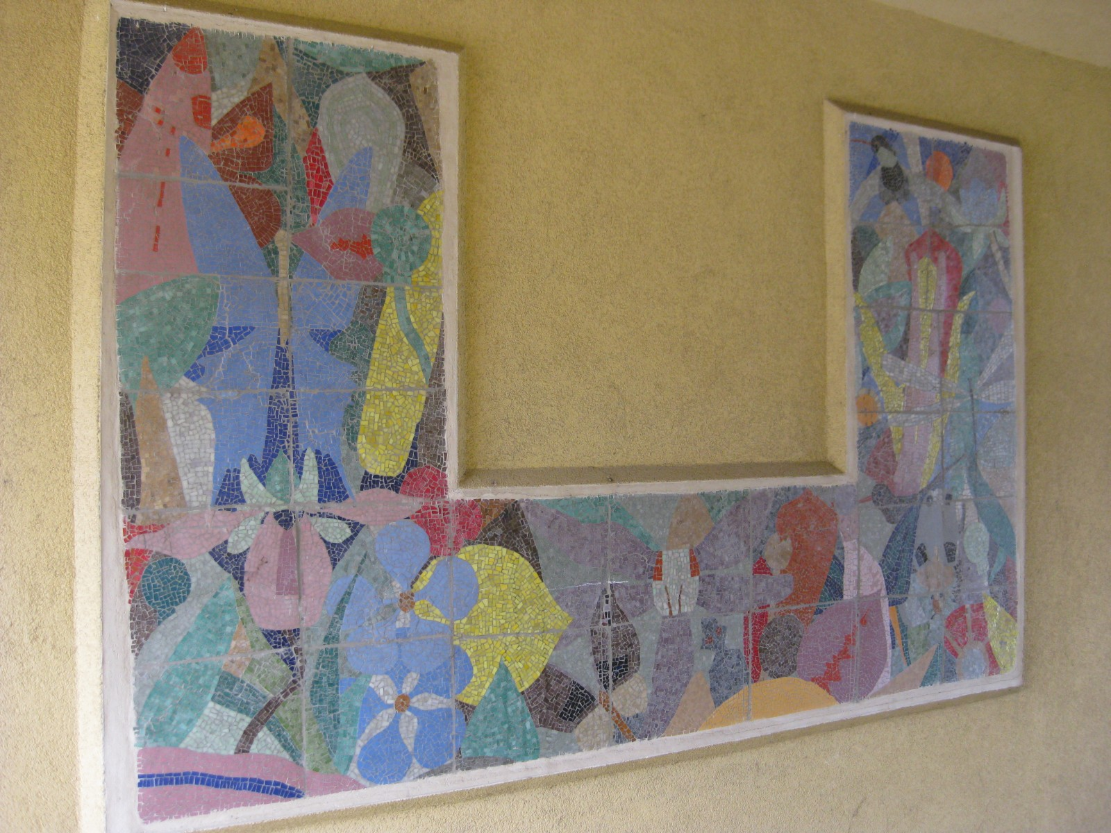 Wandmosaik Abstrakte Organismen von Siegfried Fischer, 1959, im Hausdurchgang der Wohnhausanlage Wimpffengasse 37-39, Wien Donaustadt. This media shows the Vienna residential building (Gemeindebau) with the ID 1553.